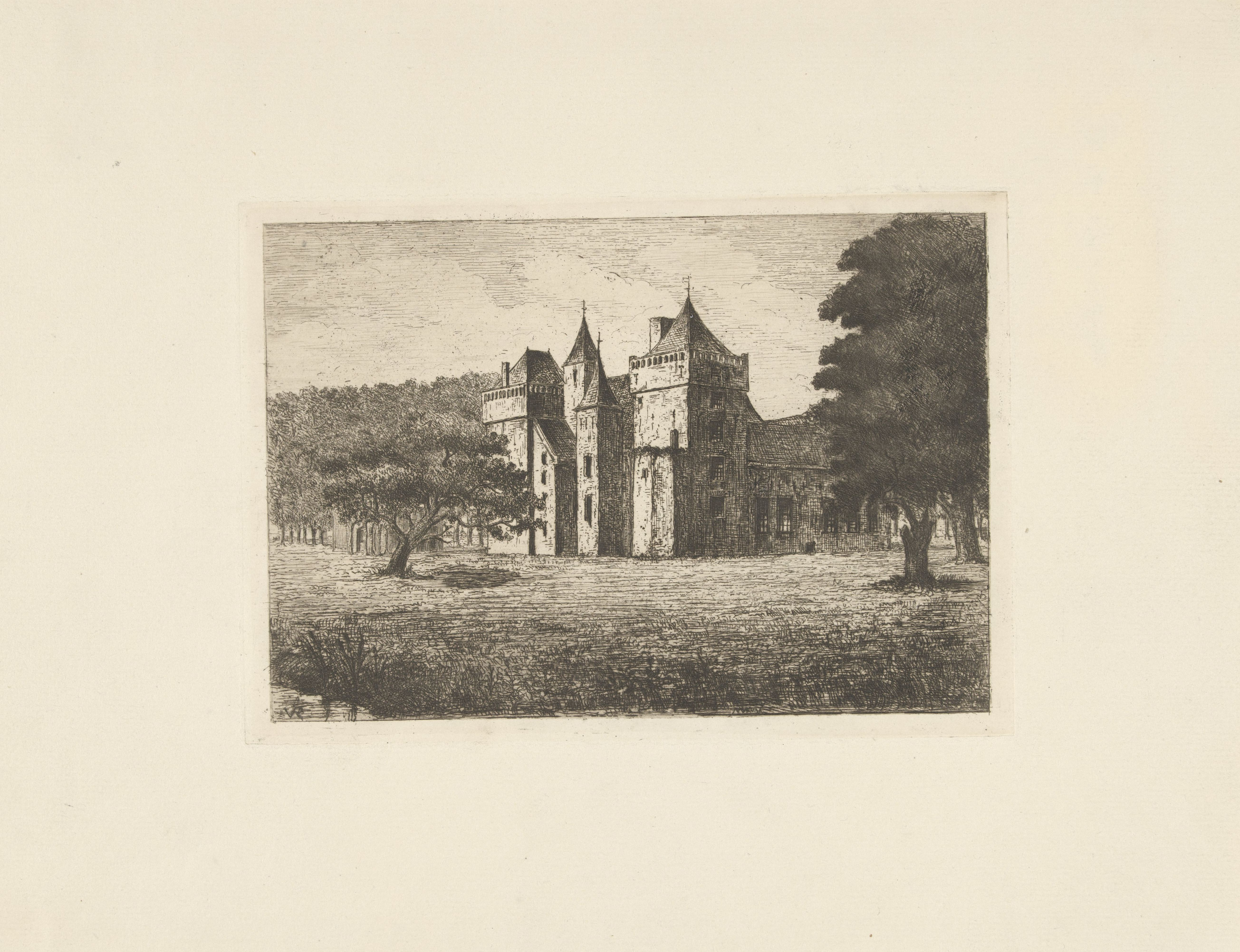 IdentificatieTitel(s): Slot AssumburgObjecttype: prent Objectnummer: RP-P-1918-589Catalogusreferentie: Collectie Rijksmuseum-2(2)Opmerking: staat bepaald aan de hand van aanwezige prenten in RijksprentenkabinetOpschriften / Merken: verzamelaarsmerk, verso, gestempeld: Lugt 2228Omschrijving: Gezicht op de zijkant van Slot Assumburg te Heemskerk. Het slot is vernoemd naar de buurtschap Assum, tussen Heemskerk en Uitgeest.VervaardigingVervaardiger: prentmaker: jonkheer Barthold Willem Floris van Riemsdijk (vermeld op object)Plaats vervaardiging: NederlandDatering: 1865 - 1942Fysieke kenmerken: ets, plaattoon en droge naald op chine colléMateriaal: papier chine collé Techniek: etsen / droge naald / plaattoonAfmetingen: plaatrand: h 140 mm × b 197 mmOnderwerpWaar: Slot AssumburgVerwerving en rechtenCredit line: Schenking van jhr. B.W.F. van RiemsdijkVerwerving: schenking 1918Copyright: Publiek domein